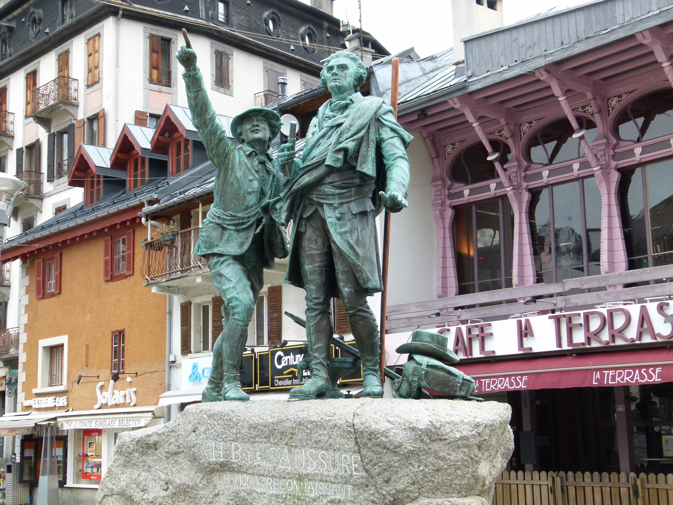 Statue von Horace-Bénédict de Saussure in Chamonix